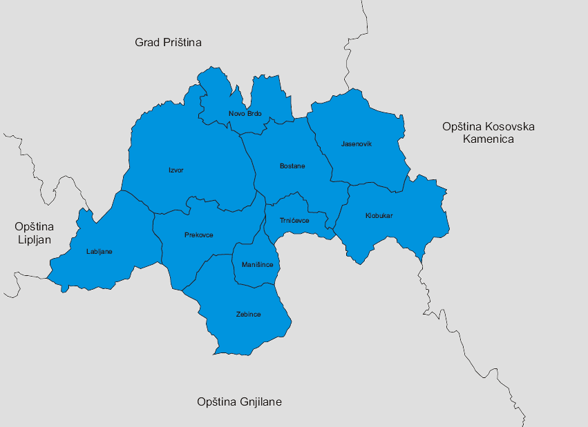 аутор Варјачић Владимир; извор: Закон о територијалној организацији Републике Србије